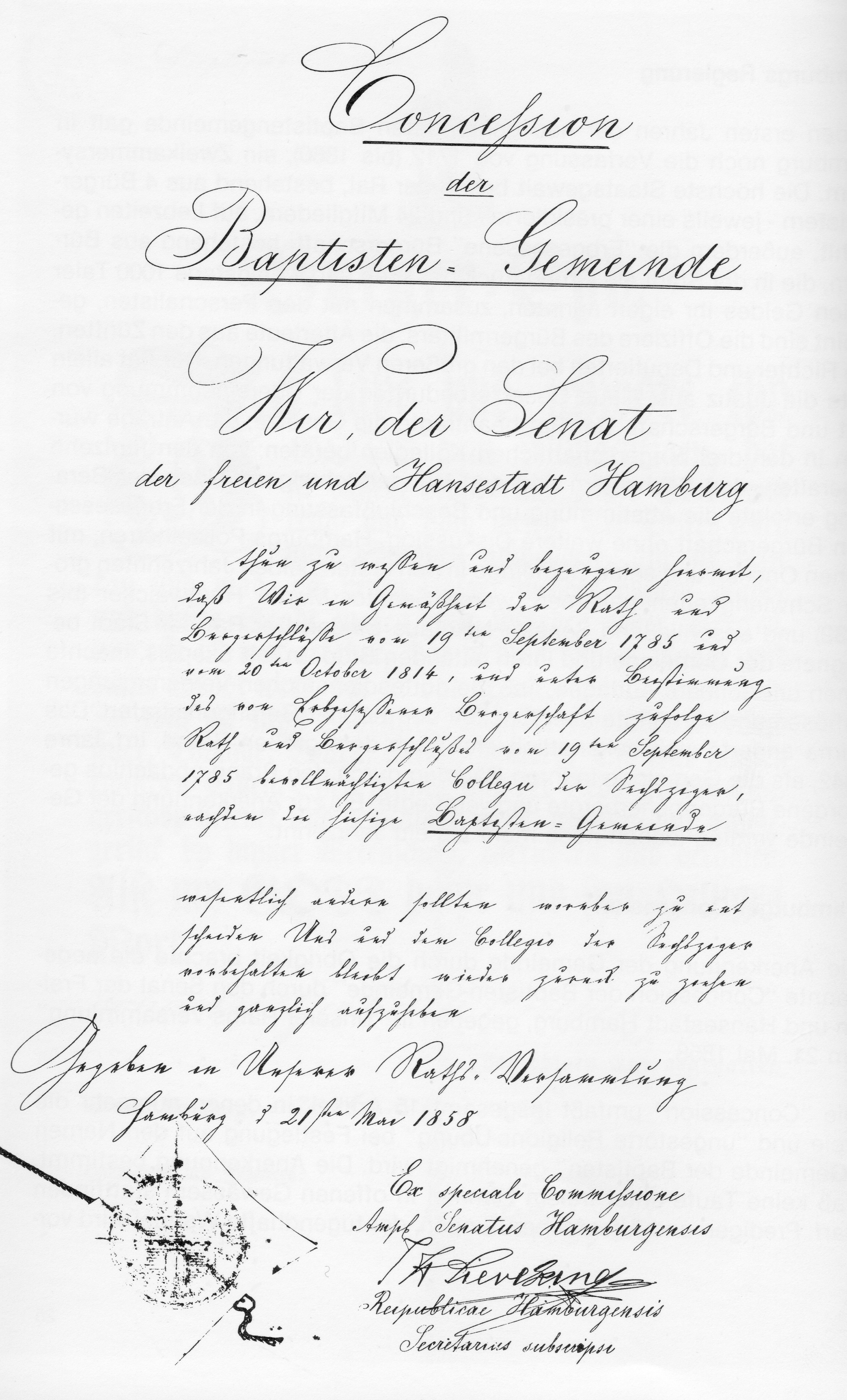 Concession des Hamburger Senates für die Baptistengemeinde Hamburg; gegeben 1858